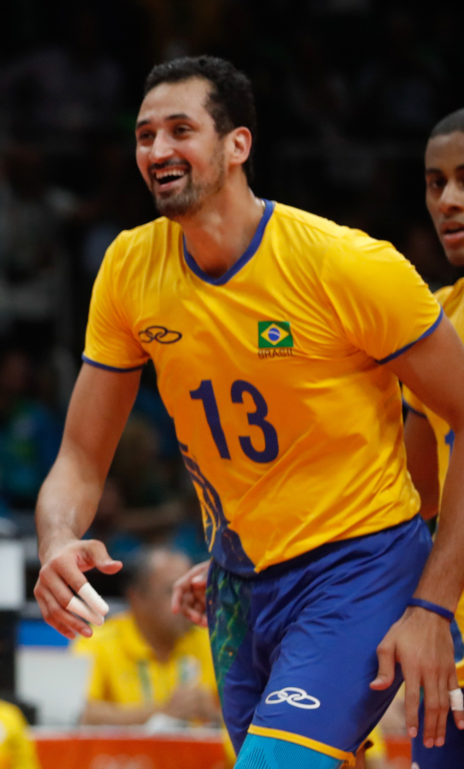 Rio de Janeiro - Seleção brasileira masculina de vôlei vence a da França por 3 sets a 1 no Maracanãzinho e vai às quartas-de-final (Fernando Frazão/Agência Brasil)